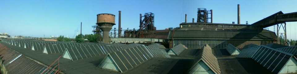 Pohled na Dolní oblas Vítkovic ze střech býv. záv. 5